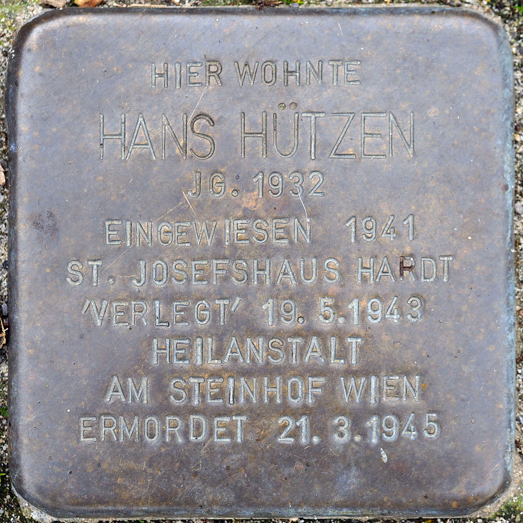 Stolpersteine MG: Hützen, Hans